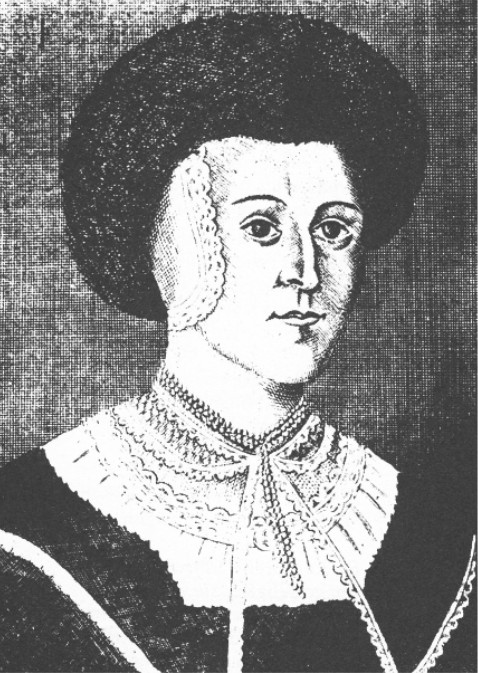 Portrait der deutschen Dichterin Anna Ovena Hoyer.